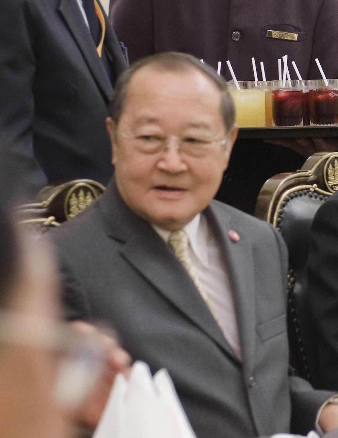 นายกรัฐมนตรีร่วมรับประทานอาหารกับคณะกรรมการพัฒนาการเศรษฐกิจและสังคมแห่งชาติ นายกรัฐมนตรีเป็นประธานในพิธีเปิดป้ายประกาศเกียรติคุณ ดร.เสนาะ อูนากูล และเพื่อแสดงความยินดีแด่ ดร.เสนาะ อูนากูล เนื่องจากสมเด็จพระจักรพรรดิอะคิฮิโตะ แห่งประเทศญี่ปุ่น ทรงพระกรุณาโปรดเกล้าโปรดกระหม่อม พระราชทานเครื่องราชอิสริยาภรณ์ชั้นสูงสุด "Grand Cordon of the Order of the Rising Sun" แก่อดีตเลขาธิการคณะกรรมการพัฒนาการเศรษฐกิจและสังคมแห่งชาติ ณ ตึกสุริยานุวัตร สำนักงานคณะกรรมการพัฒนาการเศรษฐกิจและสังคมแห่งชาติ วันจันทร์ ที่ 28 มิถุนายน พ.ศ 2553 (The Official Site of The Prime Minister of Thailand Photo by พีรพัฒน์ วิมลรังครัตน์)